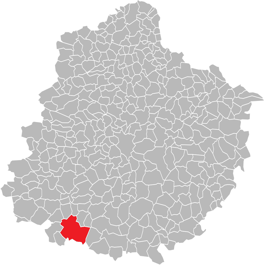 Localisation de La Flèche dans le département de la Sarthe